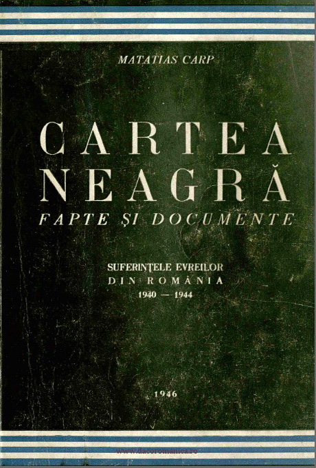 Matatias Carp - Cartea Neagră, ed.1946, colecția autorului